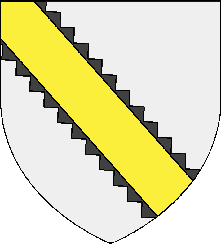 Blason Monnier de Romefort, d'argent à la bande dentelée de sable remplie d'or